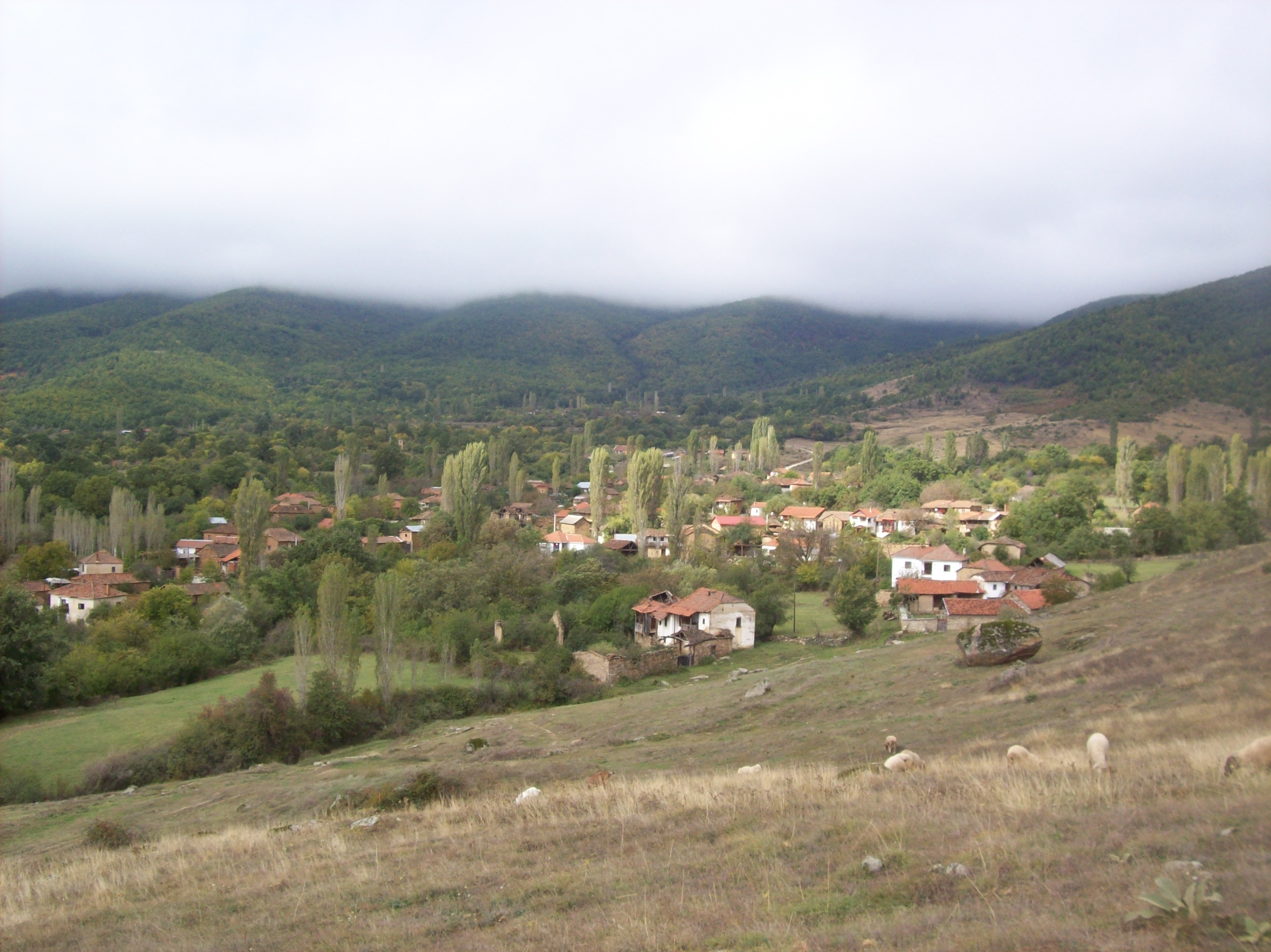 Долгаец, прилепско